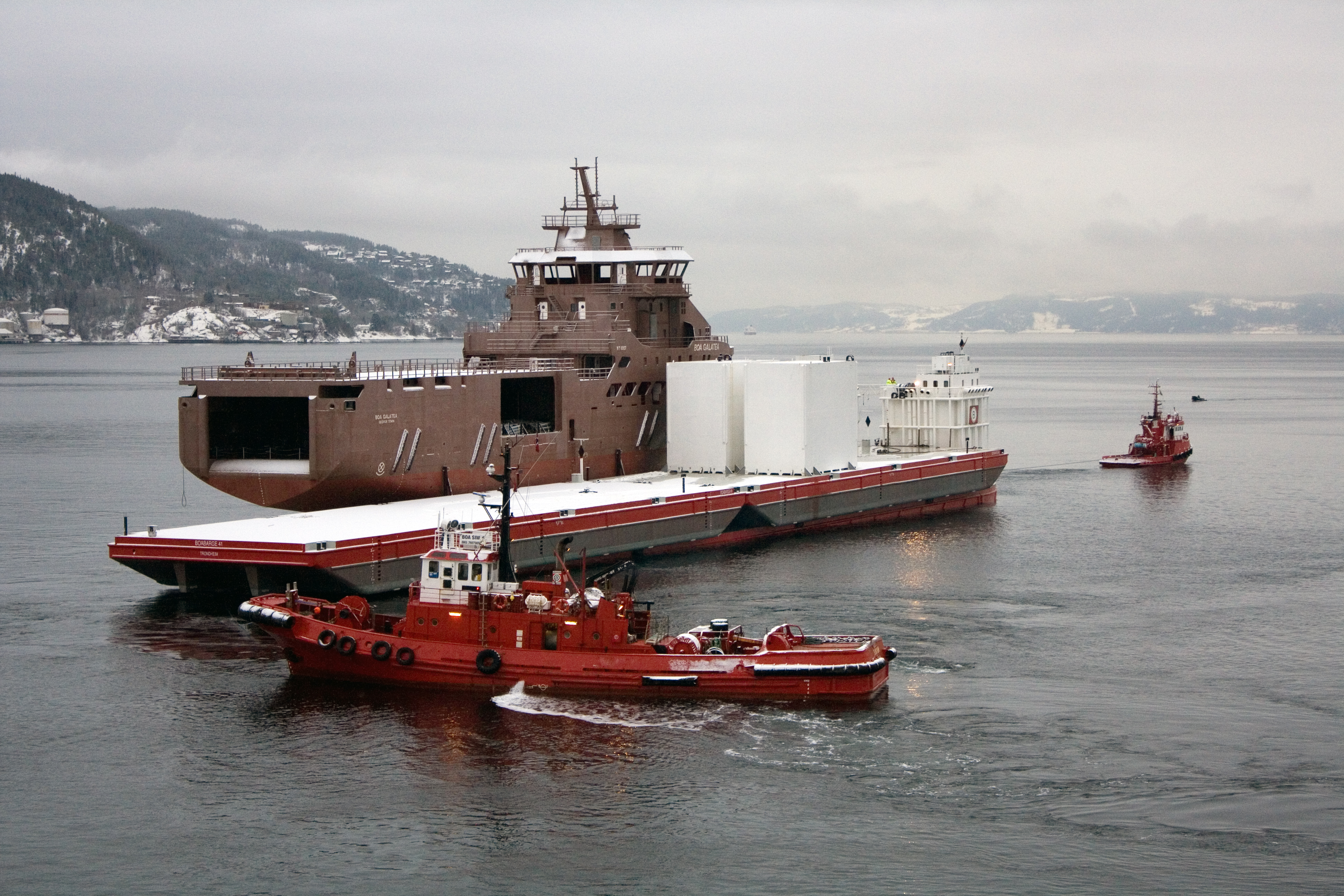 Lekteren Boa Barge 30 slepes ut mot Munkholmen. Dekk ligger så vidt over havnivå. Slepebåten nærmest kamera er Boa Siw.